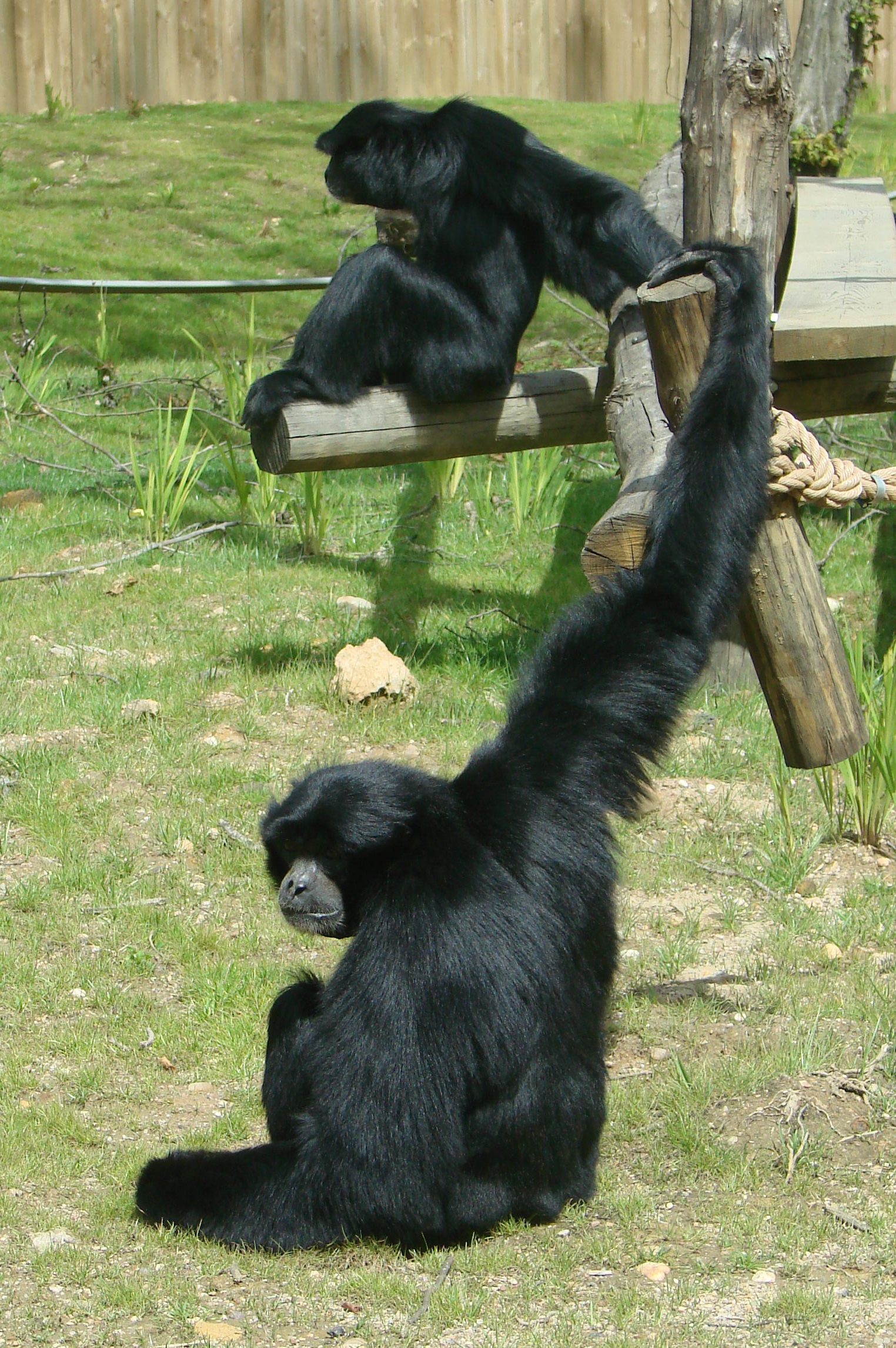 Siamangs (Hylobates syndactylus /symphalangus syndactylus), zoo d'Amnéville.